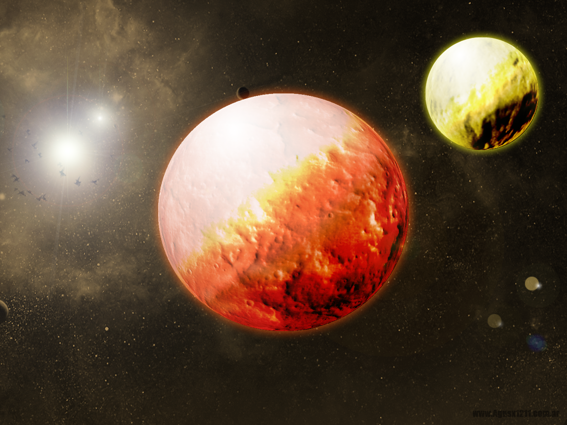 Planeta Ficticio con su correspondiente luna, en un sistema con estrella binaria